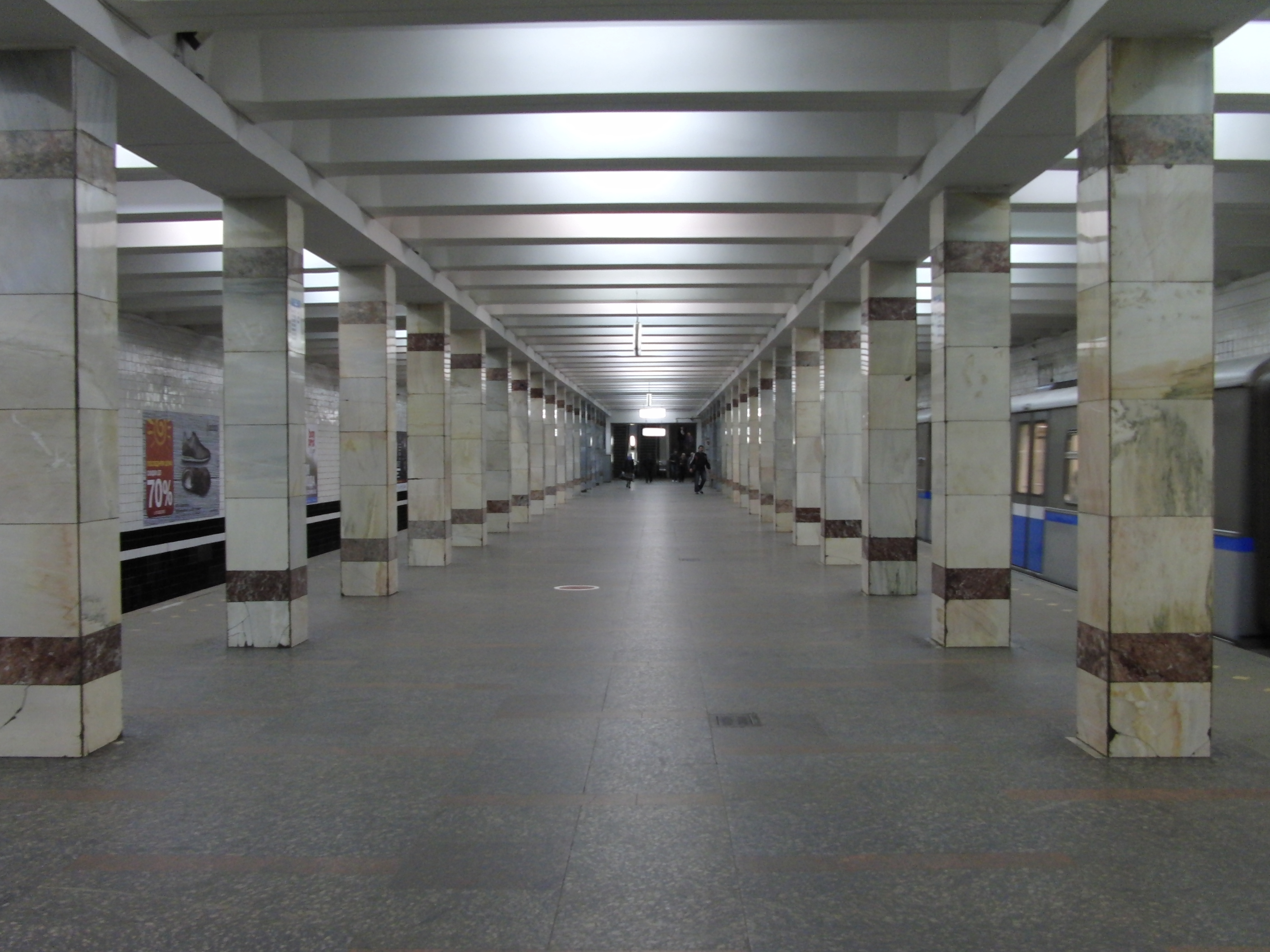 MolodezhnayaMoscow